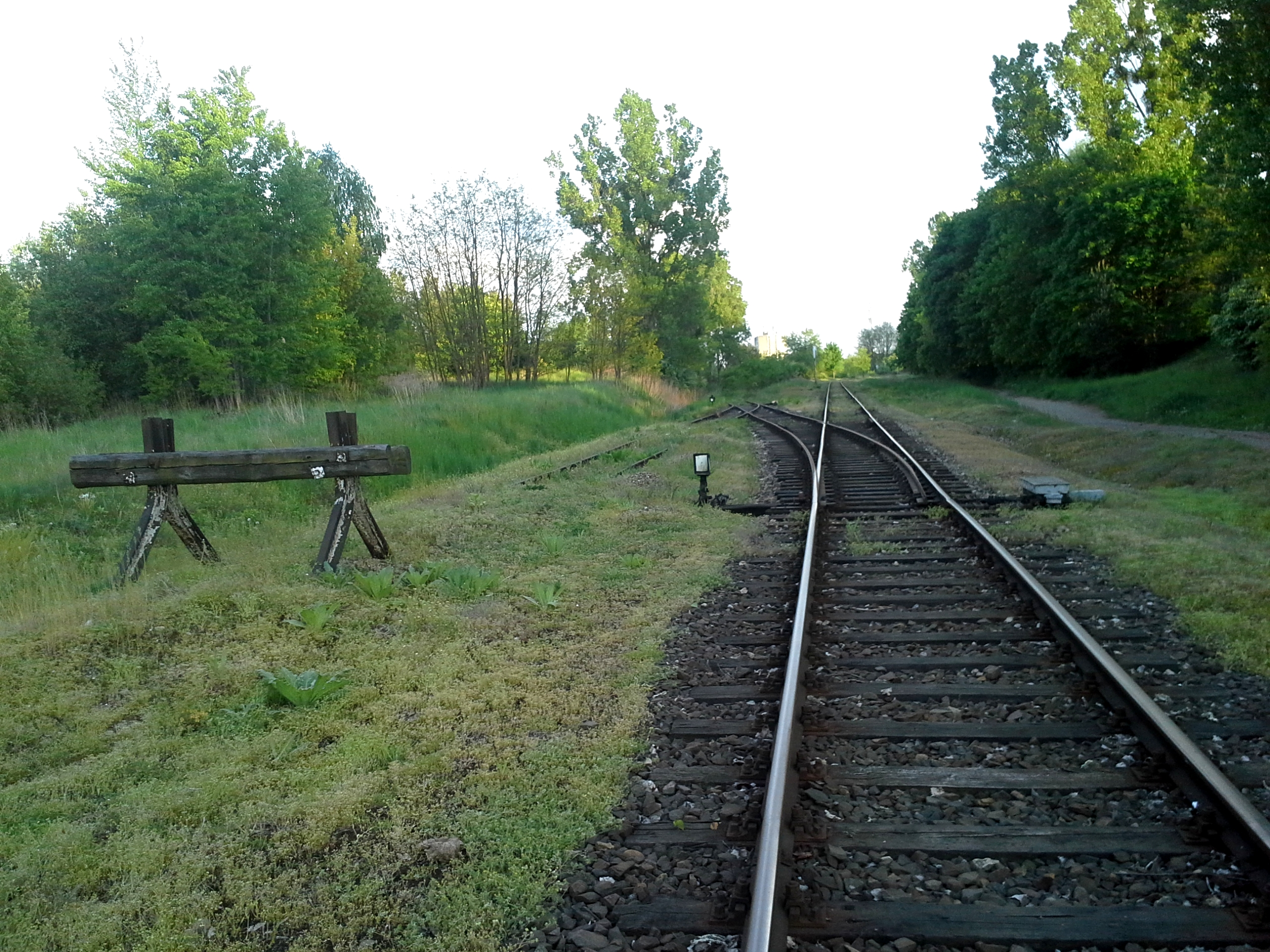 Linia kolejowa nr 374, bocznica do zakładu na ul. Przemysłowej w Pile